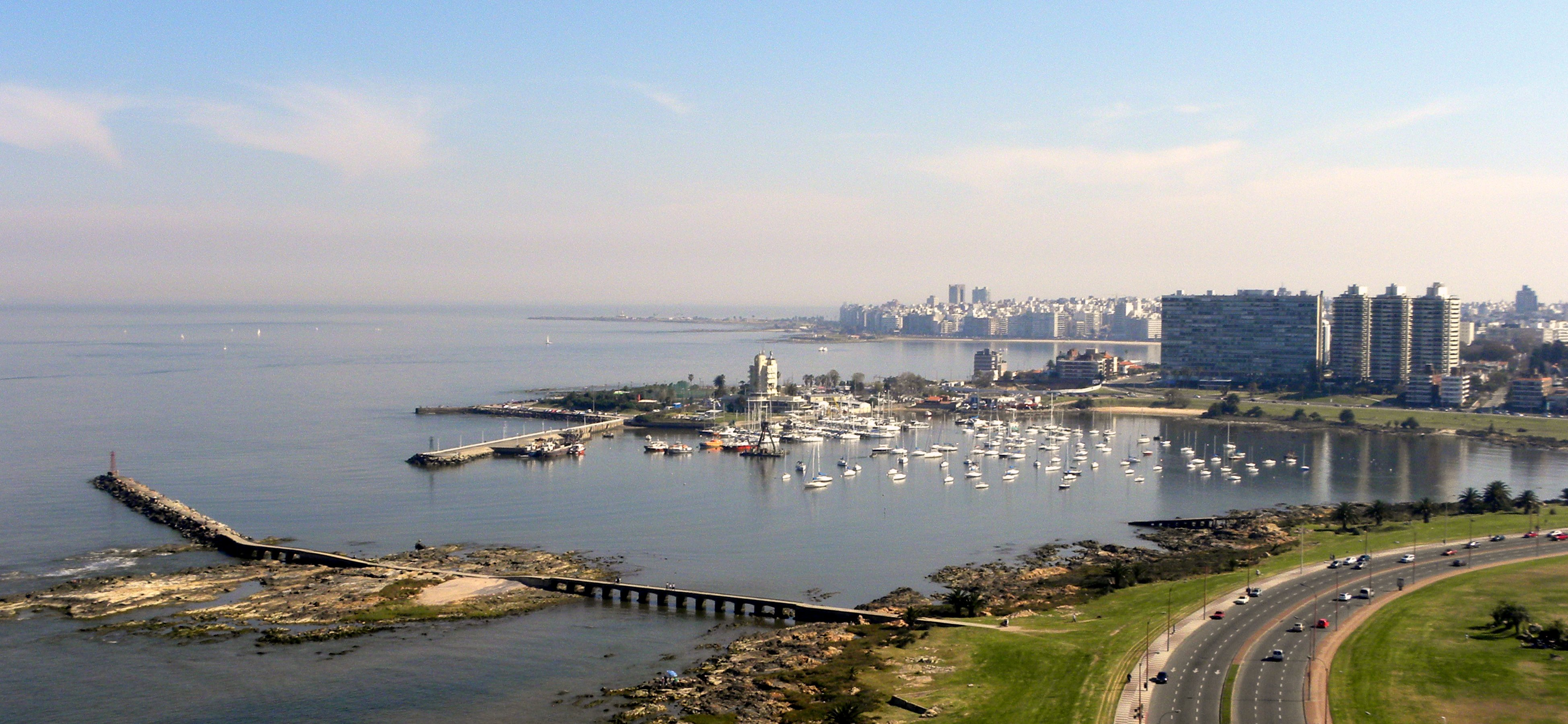 Yacht Club. Ubicada en el departamento de Montevideo